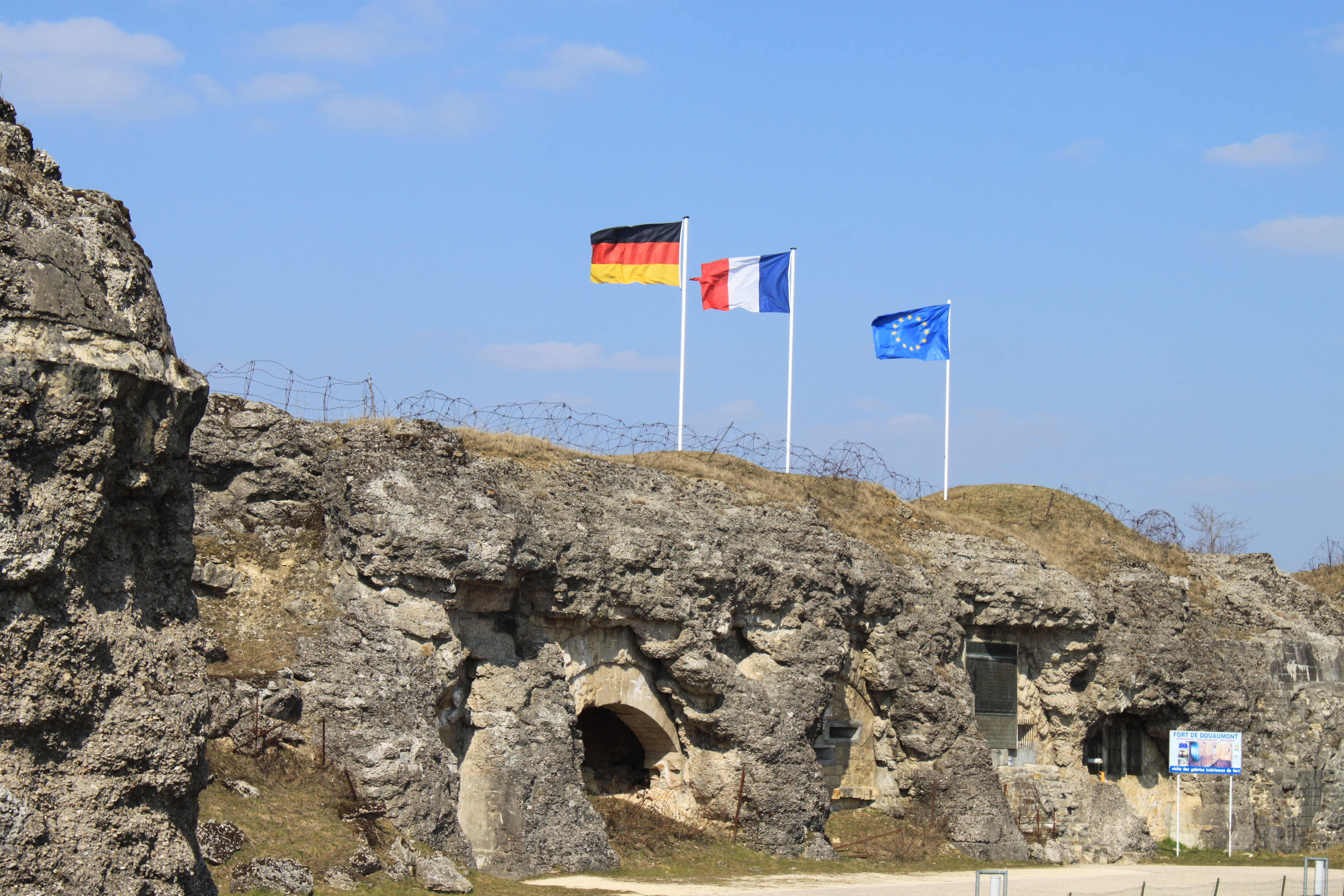 Fort Doaumaont Kasernenbereich